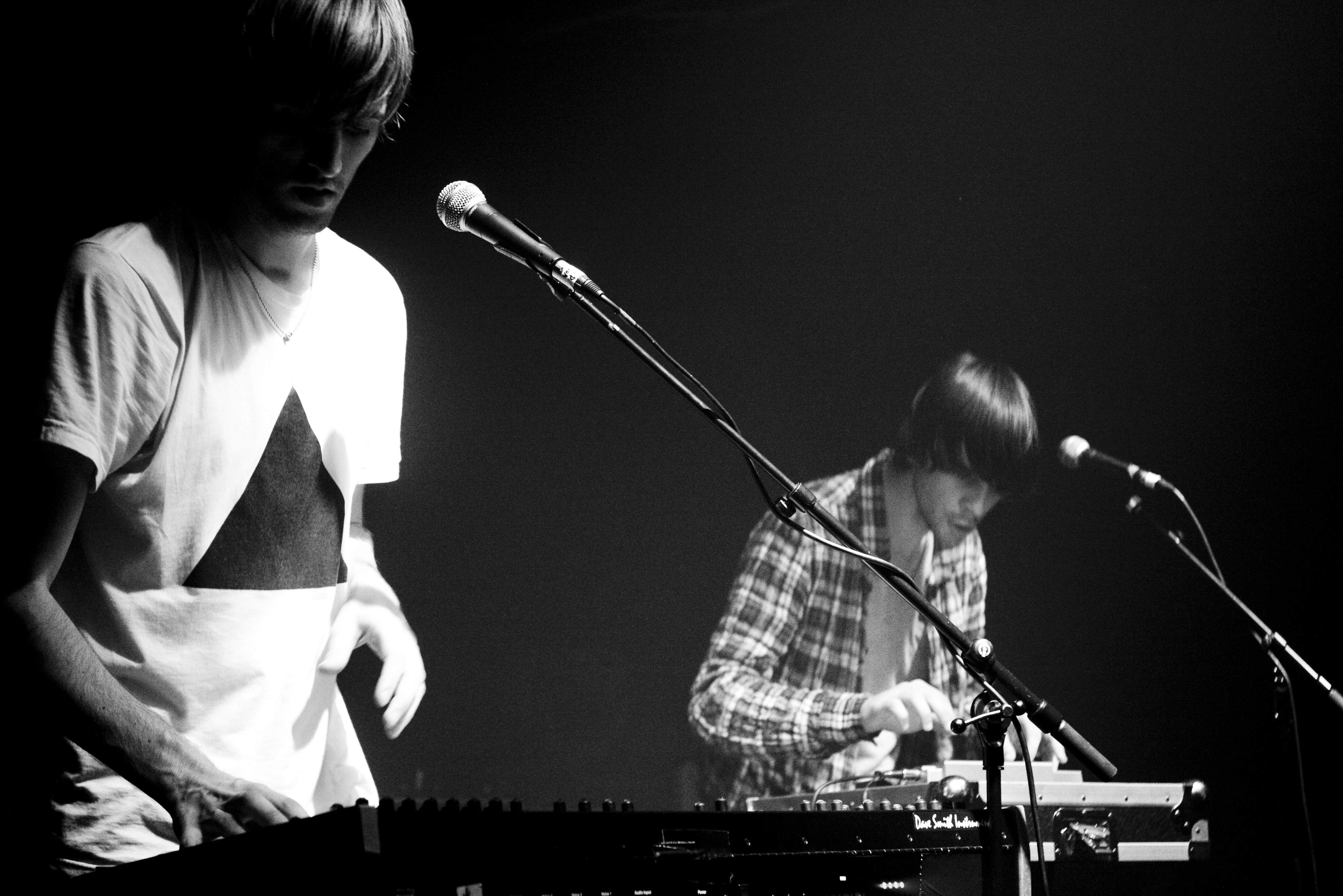 Cut Copy - Le Point Ephémère - Paris Xème - February 29, 2008 Modular Party